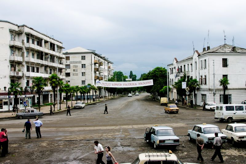 Изглед от центъра на града.